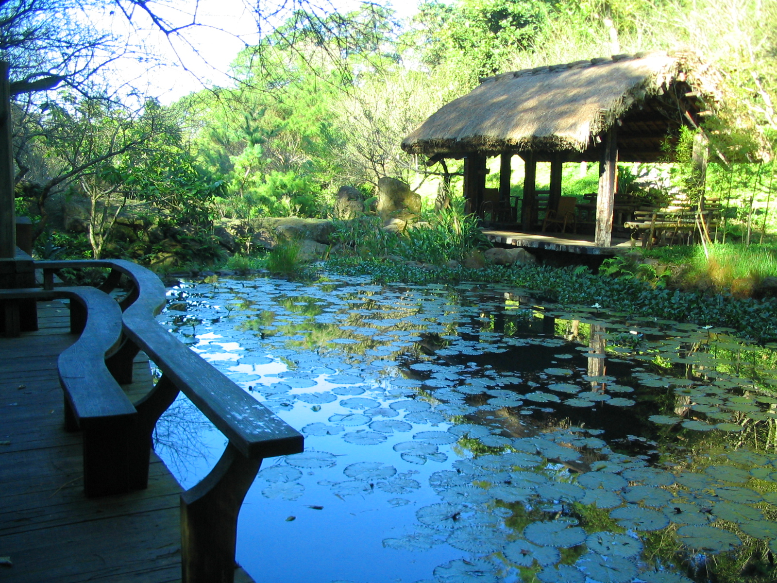 華陶窯自然生態植物園